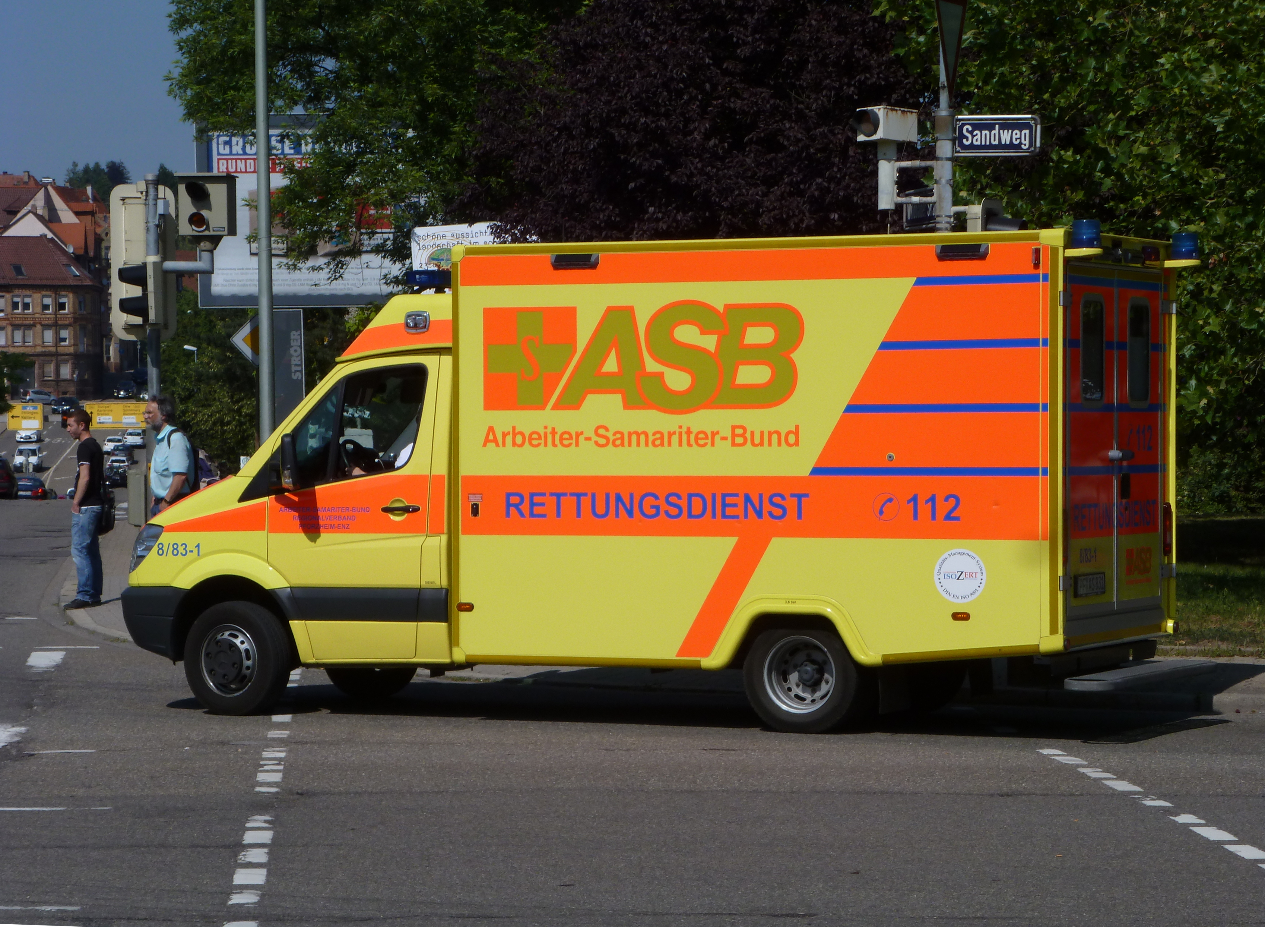 Ambulance à Pforzheim.